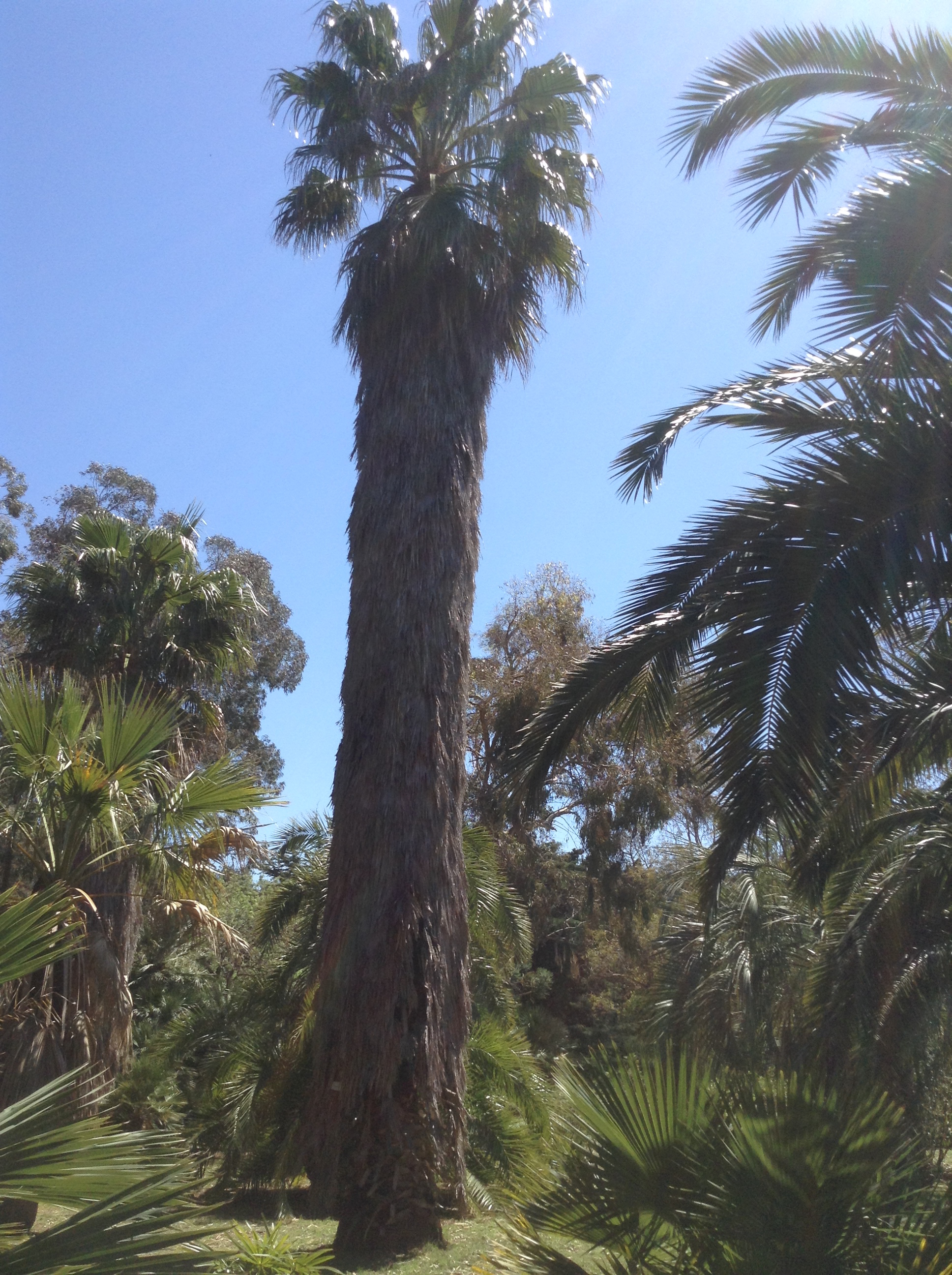 L'arbre arecaceae fait partie de la flore de l'île de Lokrum.